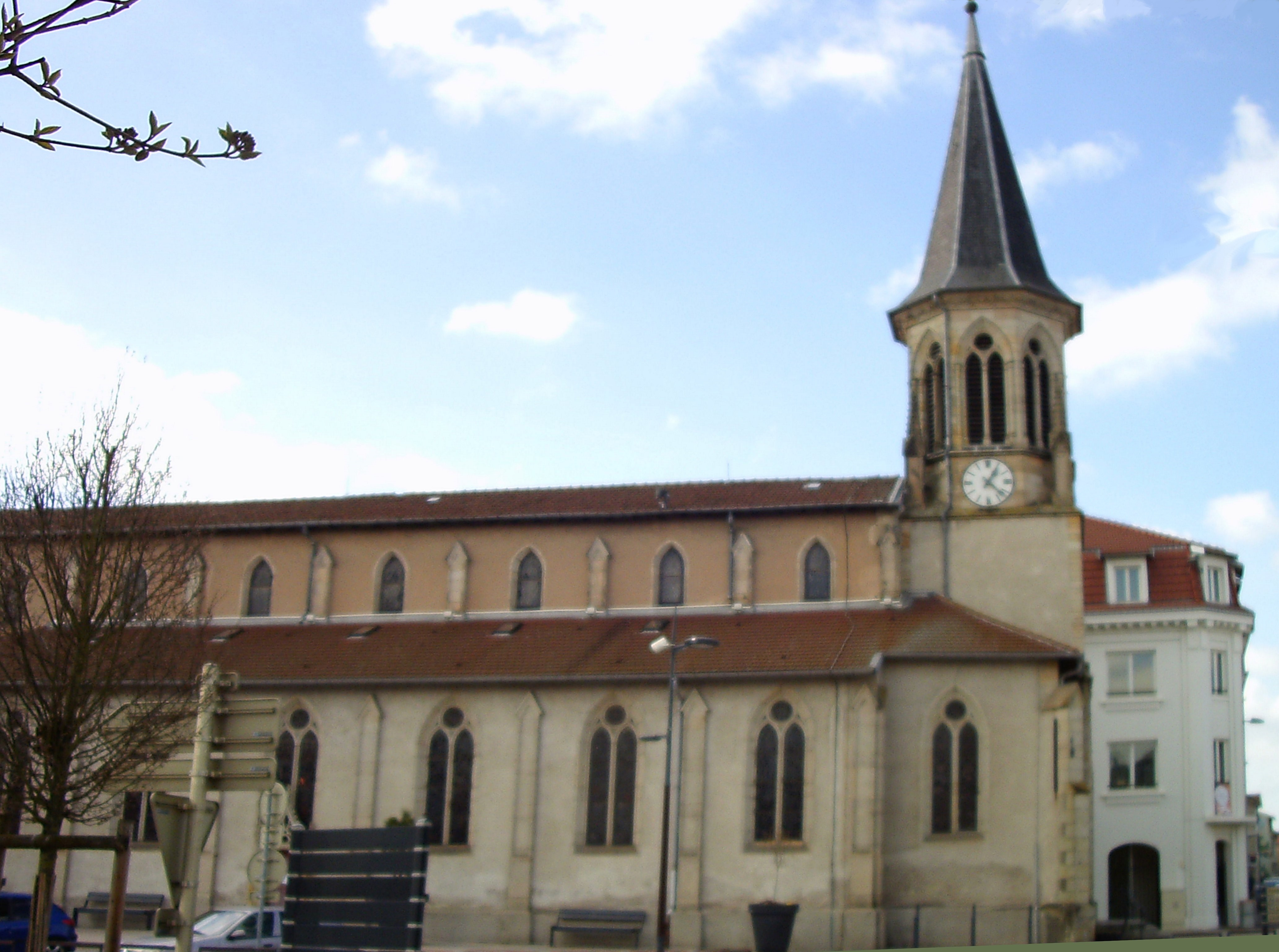 L'église Saint-Brice de Thaon-les-Vosges